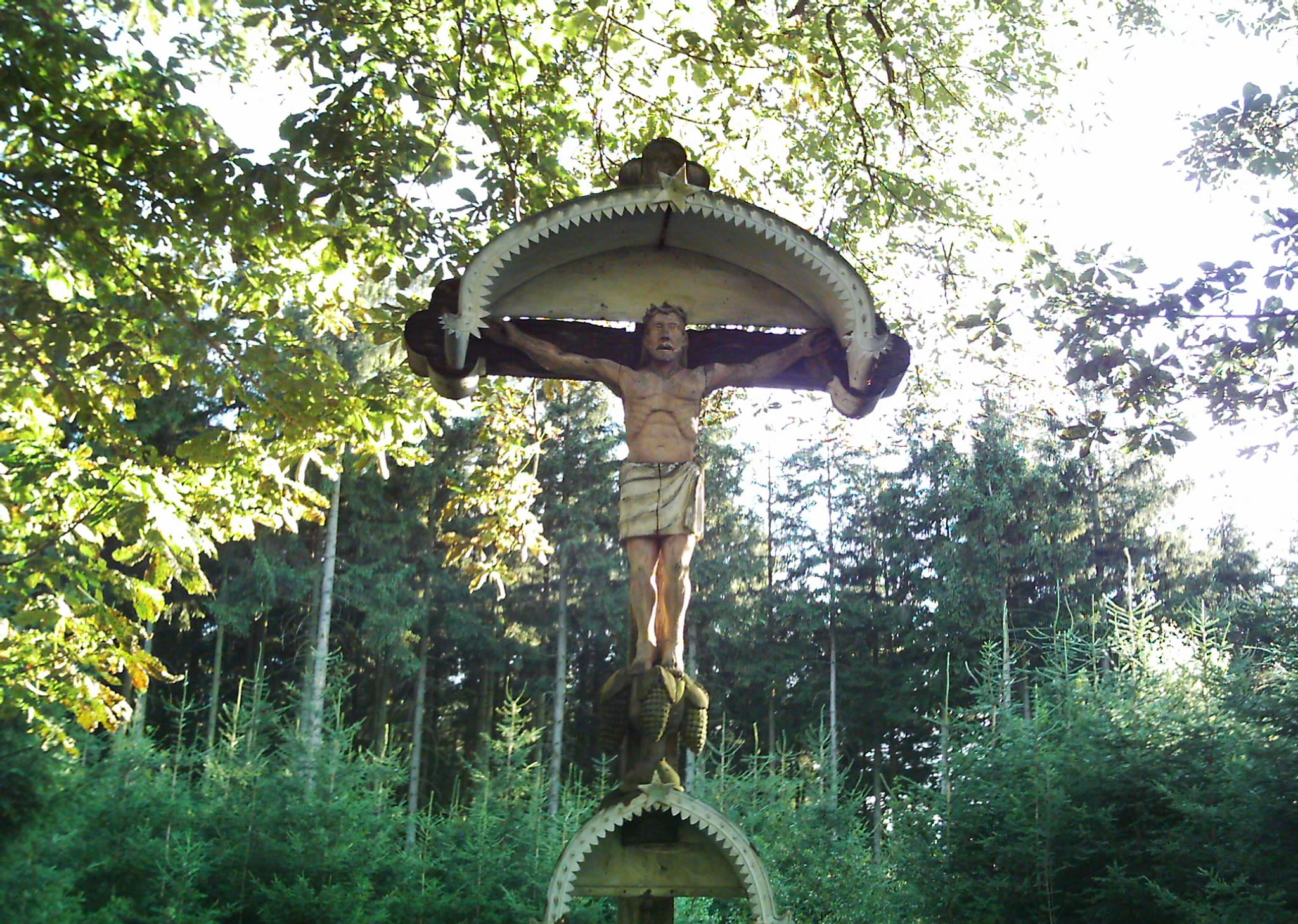 Detail, Feldkreuz zwischen Hirschbronn und Steinhausen an der Rottum, Landkreis Biberach, Deutschland